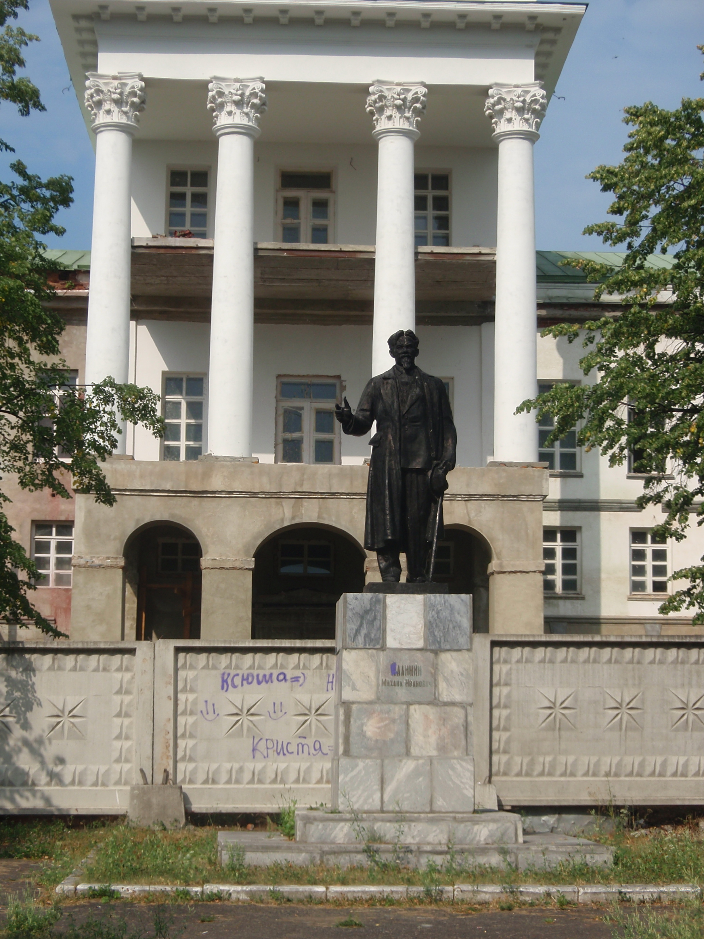 Памятник М.И. Калинину: площадь Карла Маркса, 2, Кыштым, Челябинская область